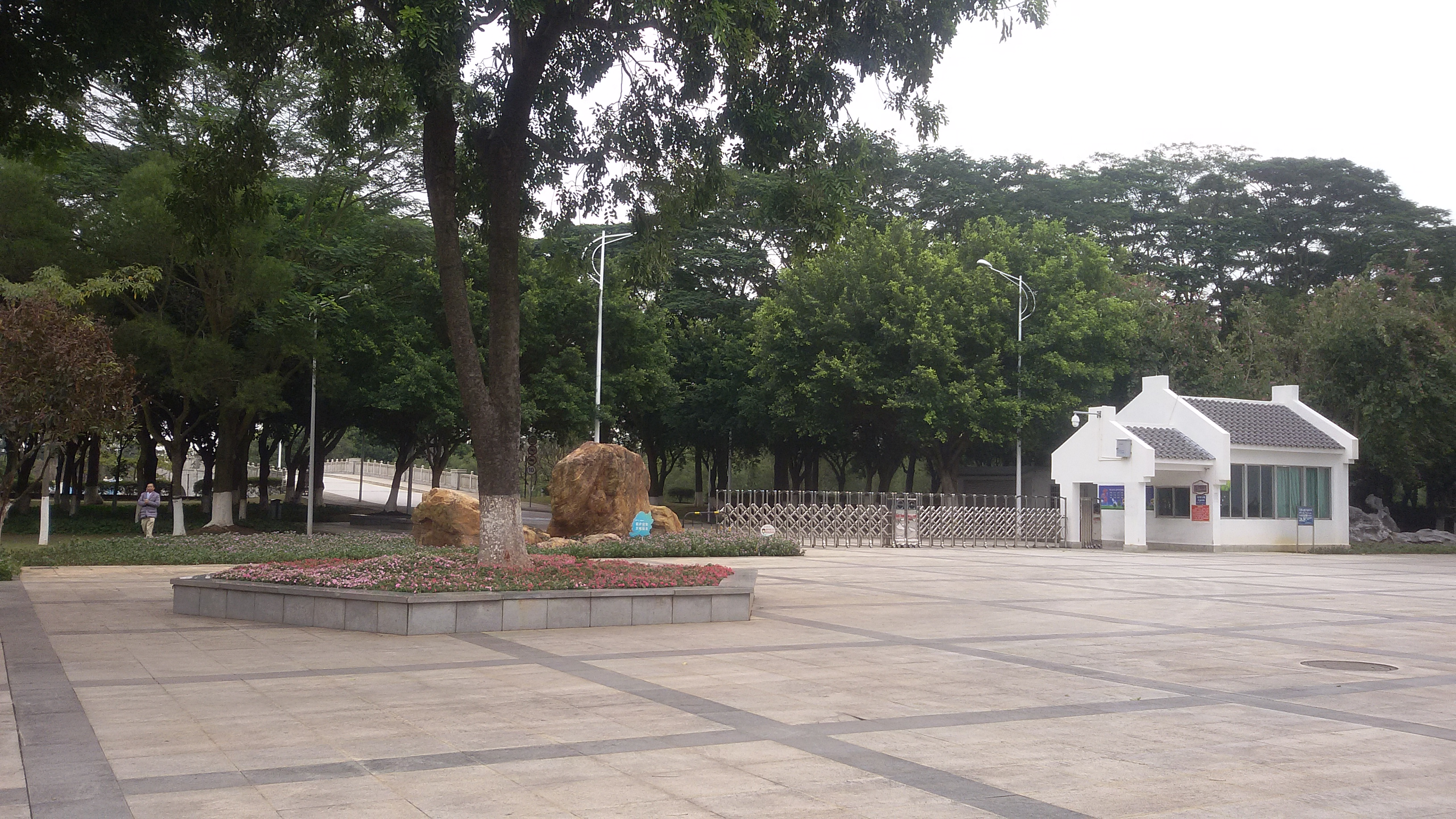 粵語: 南沙滨海湿地西门